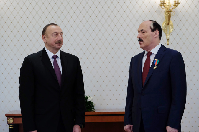 Ильхам Алиев вручил Абдулатипову орден "Достлуг" (Дружба).